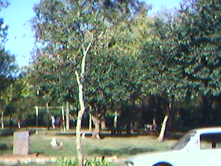 Praça Adolfo Moritz Friedrich, no Bairro Marina, Cachoeira do Sul